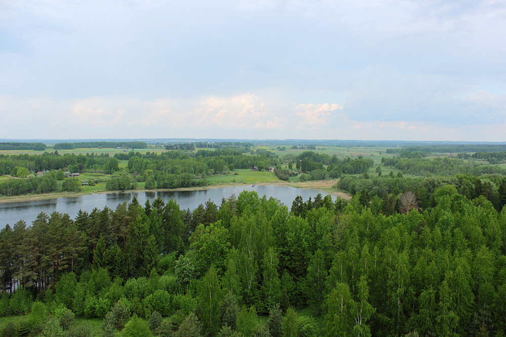 Sartai